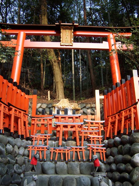 Mini torii and kitsune at the Fushimi Inari shrineFushimi Inari - small shrine